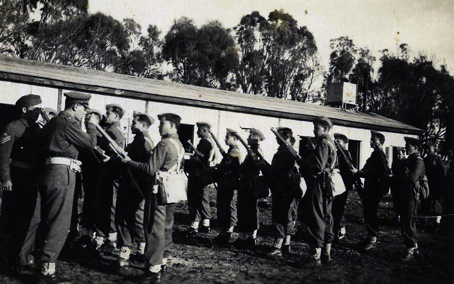 מסדר נשקים